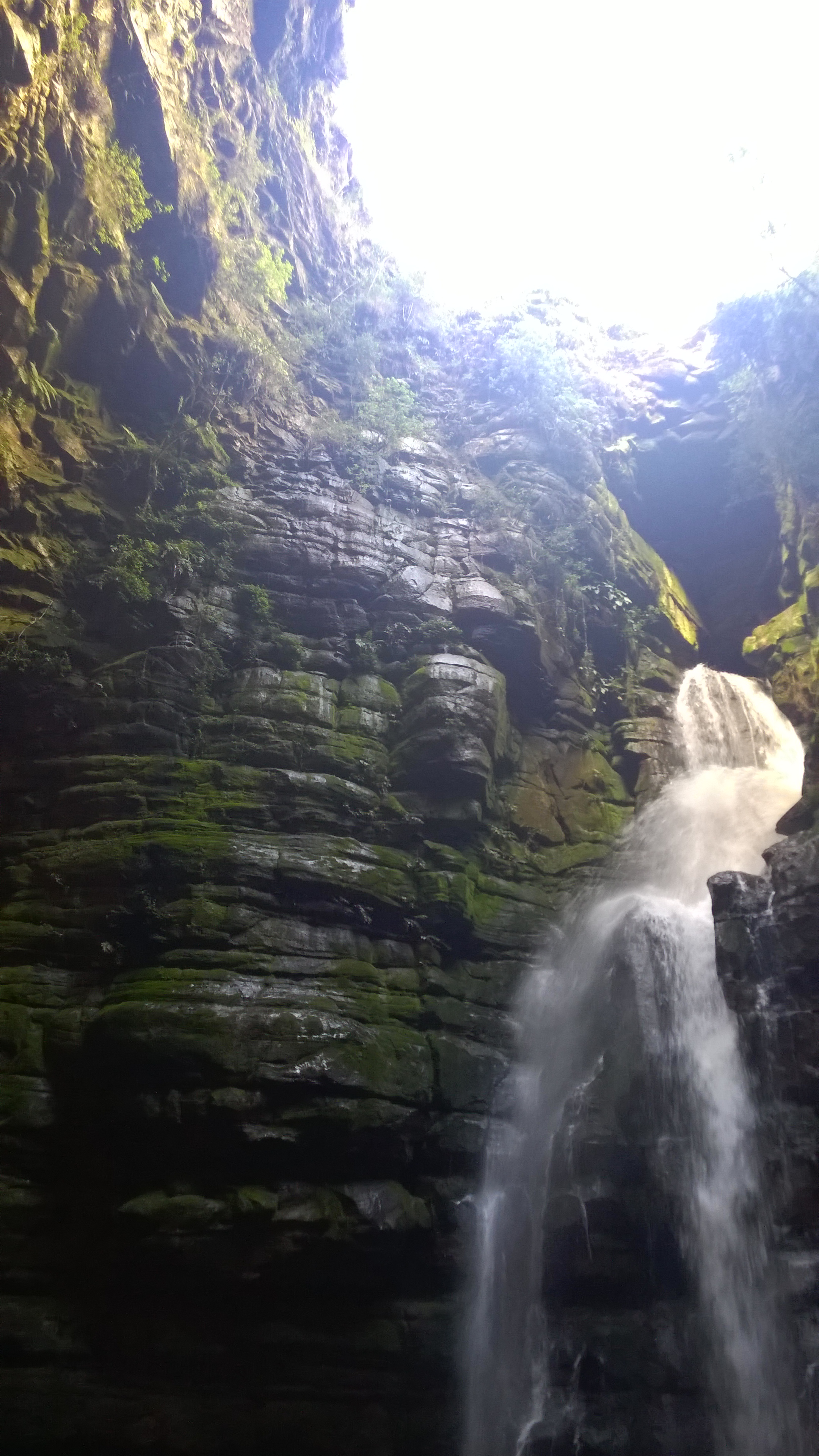 Água precipitando de aproximadamente 40 metros de altura.